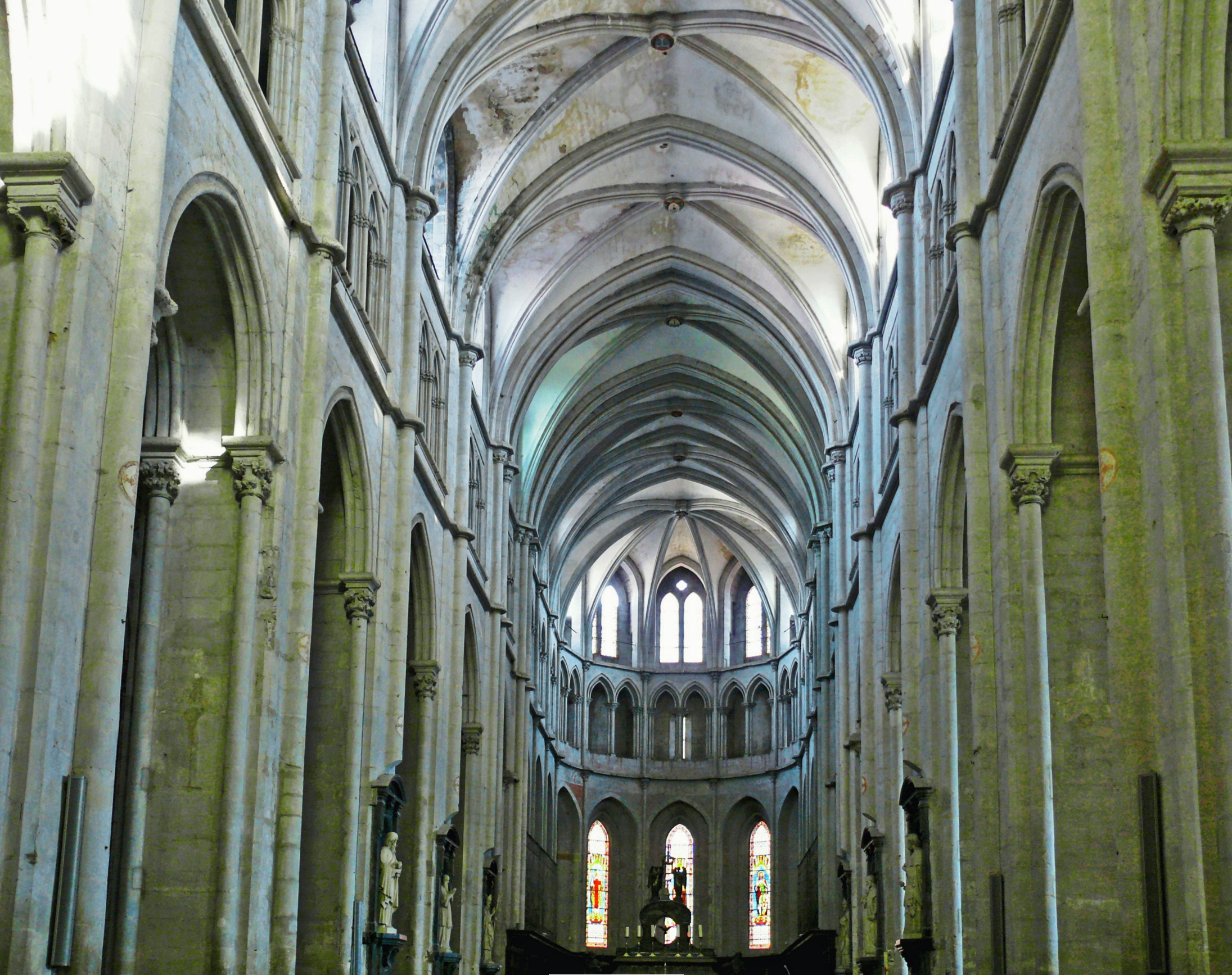 Abbatiale de Saint-Antoine-l'Abbaye - Nef vers le choeur